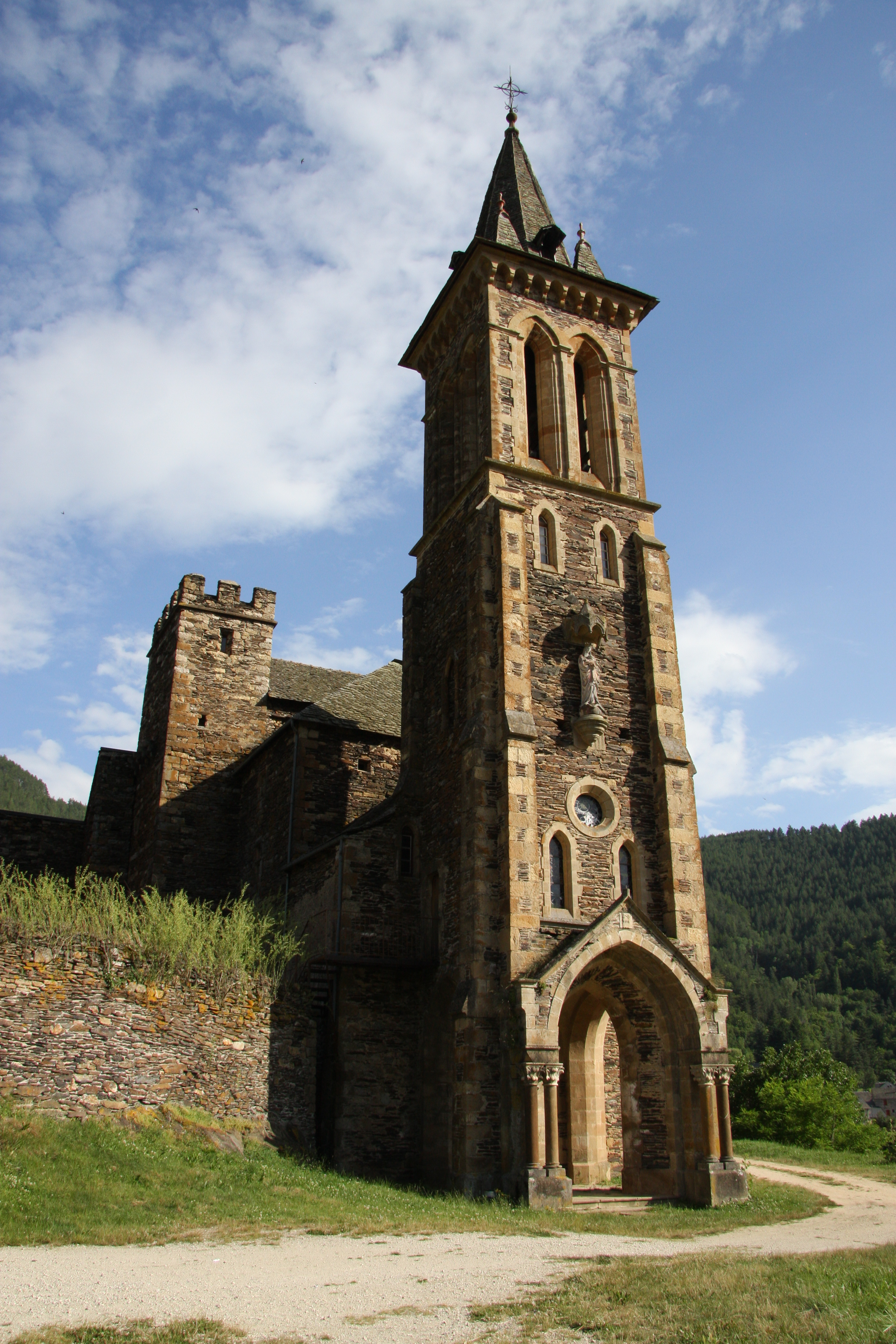 Collégiale de Bédouès en Lozère (France)